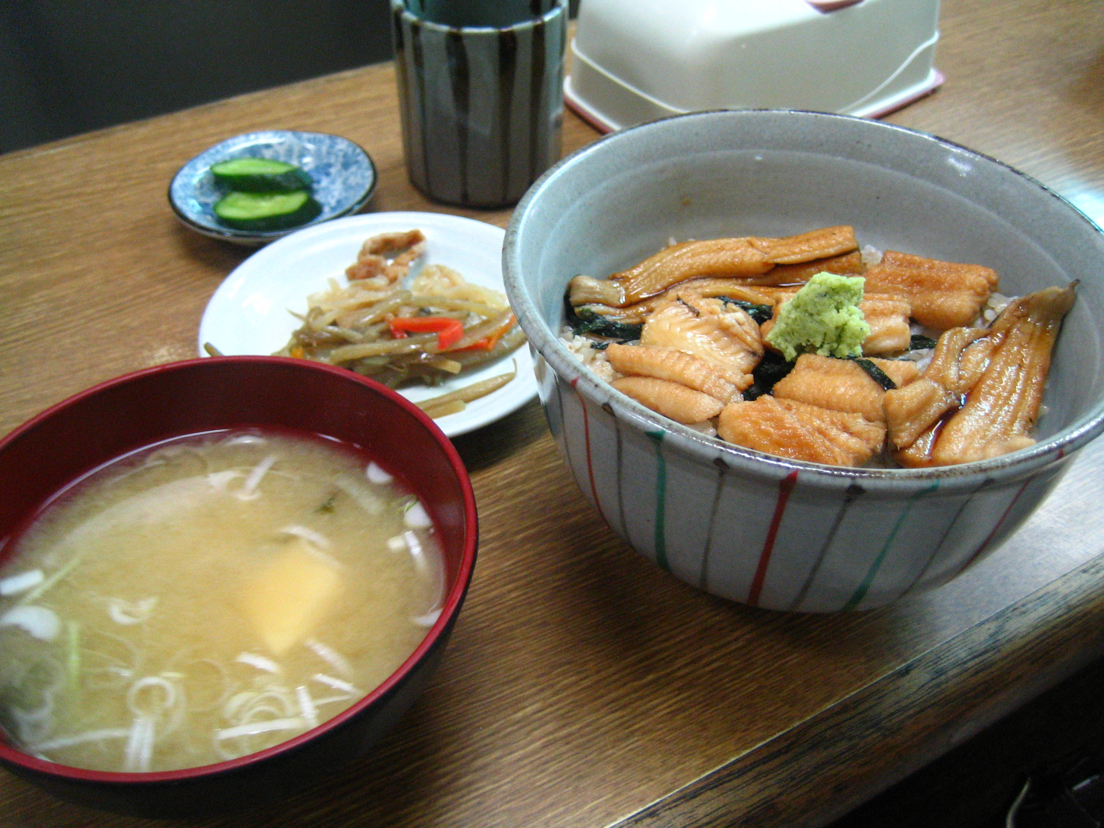 at fish restaurant Takahashi, Tsukiji fish market, Tokyo